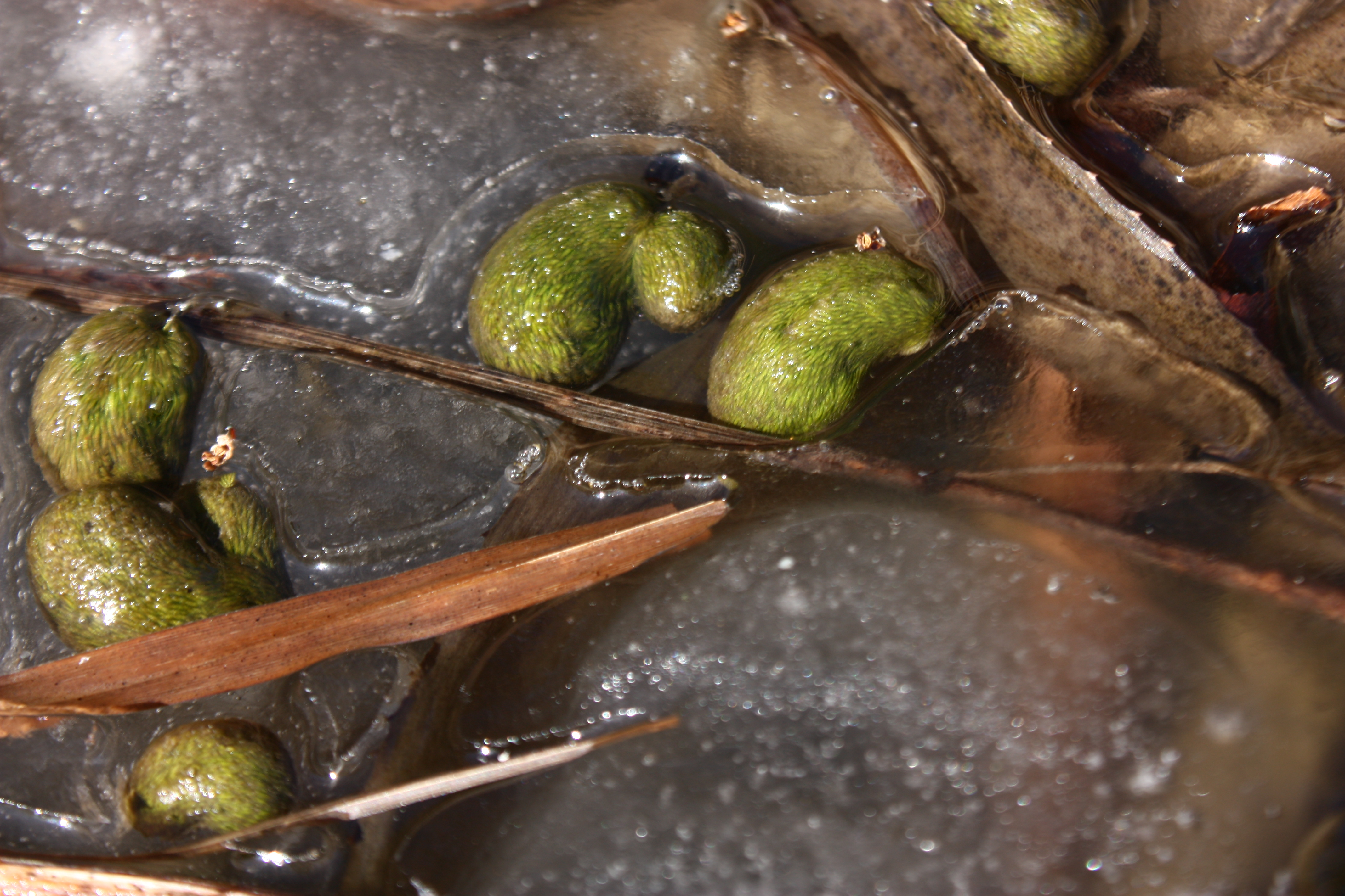 Utricularia australis, bublinatka jižní, Gymnázium Brno-Řečkovice